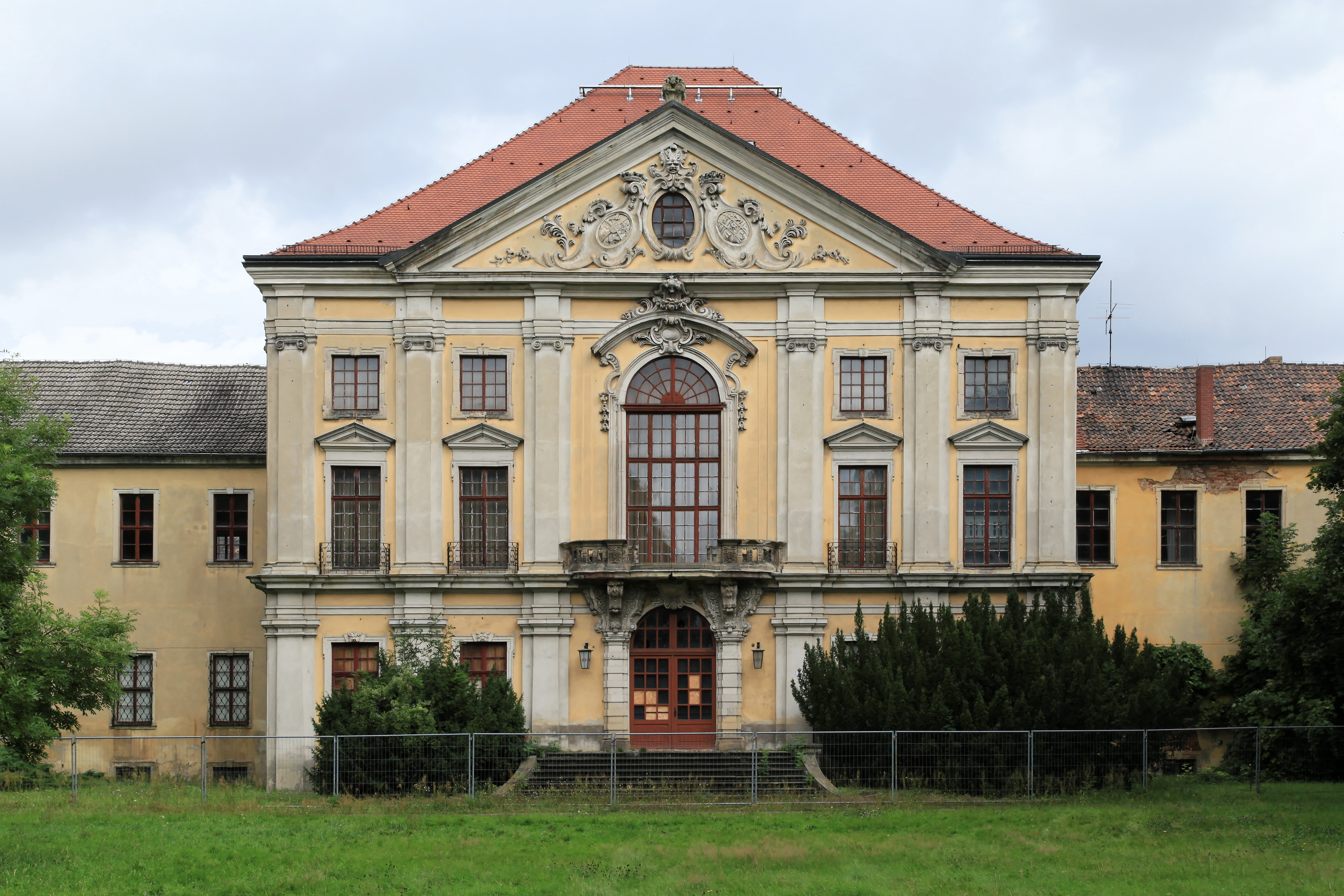 Schloss Schönwölkau, Kirchplatz in Wölkau, Schönwölkau